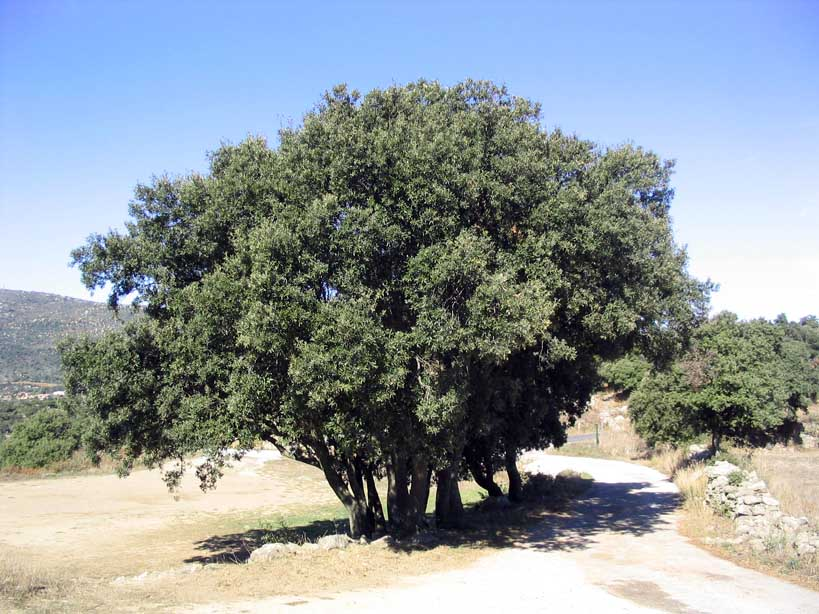 Chêne vert (Quercus ilex) à Marcevol (Arboussols, Pyrénées-Orientales, France).